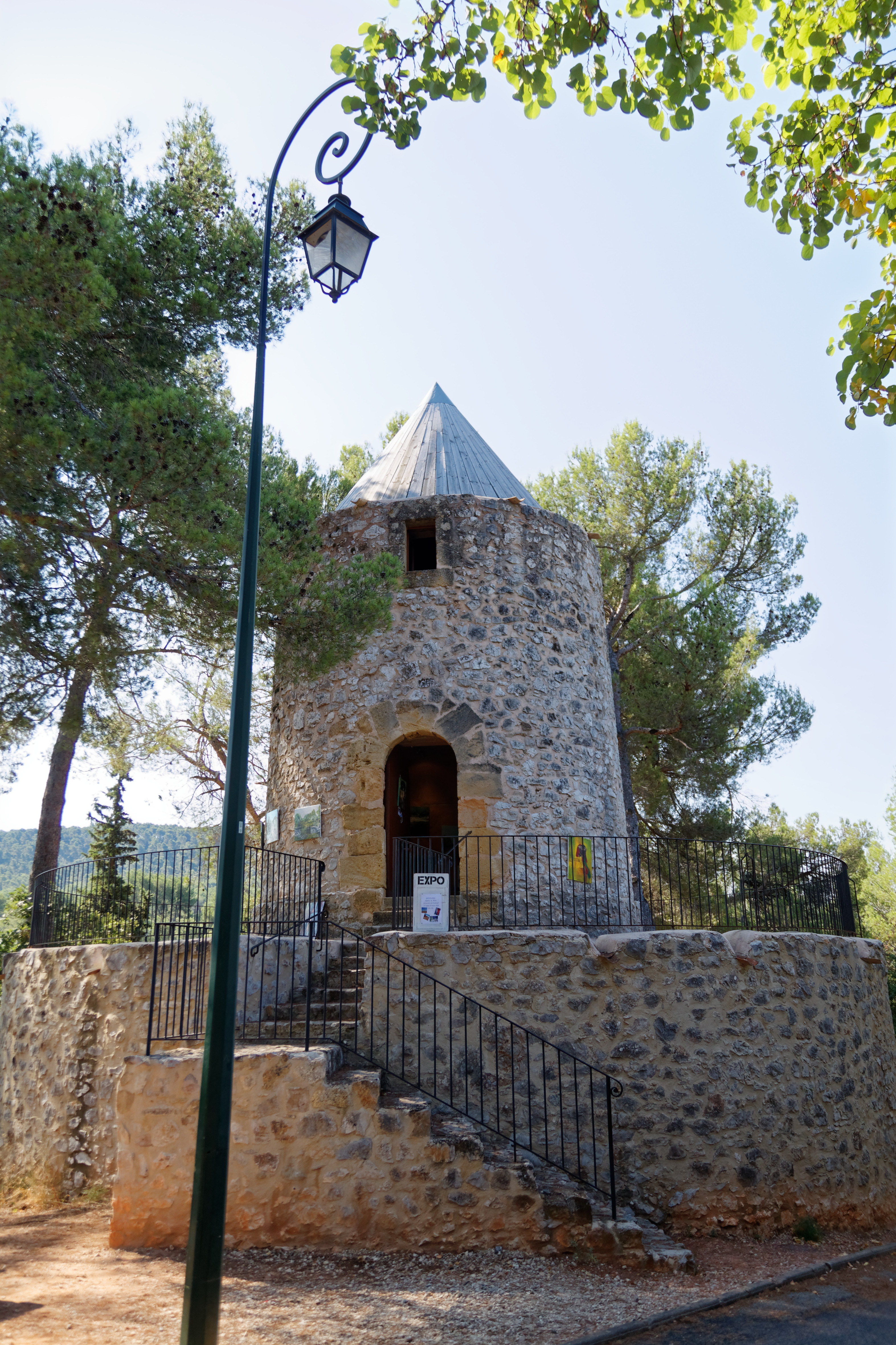 Moulin Cezanne, eine historische Windmühle in Le Tholonet